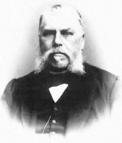 Willem Hellema, burgemeester Achtkarspelen.